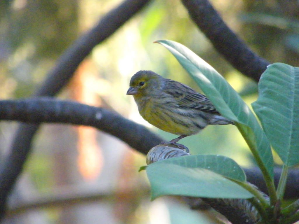 Canary, Serinus canaria, Santa Cruz de la Palma, Canary Islands.